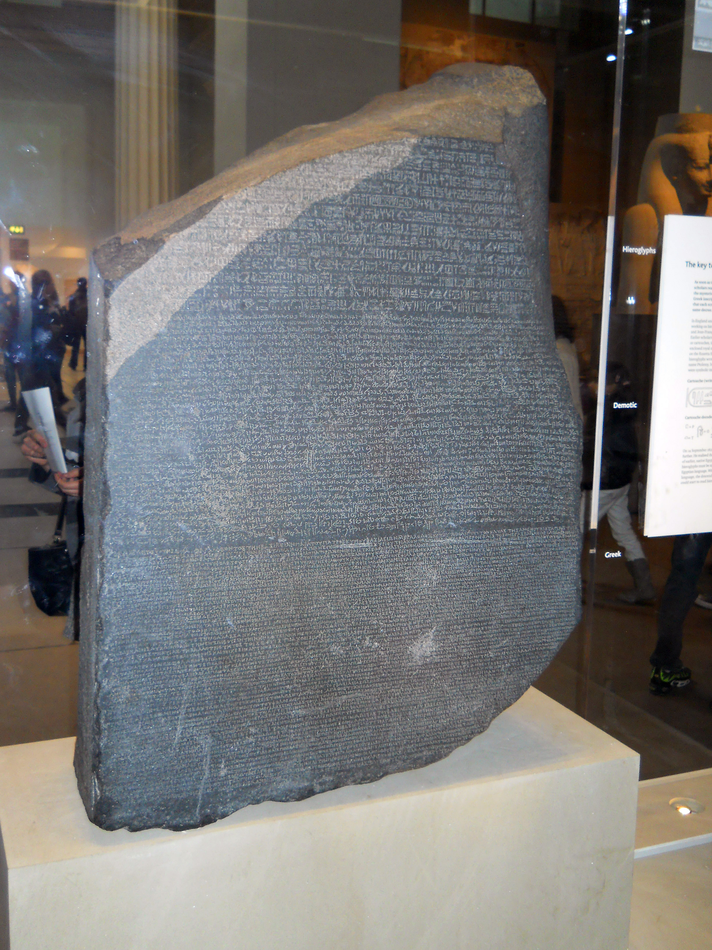 Розеттский камень в экспозиционной витрине Британского музея в Лондоне. Оригинал.